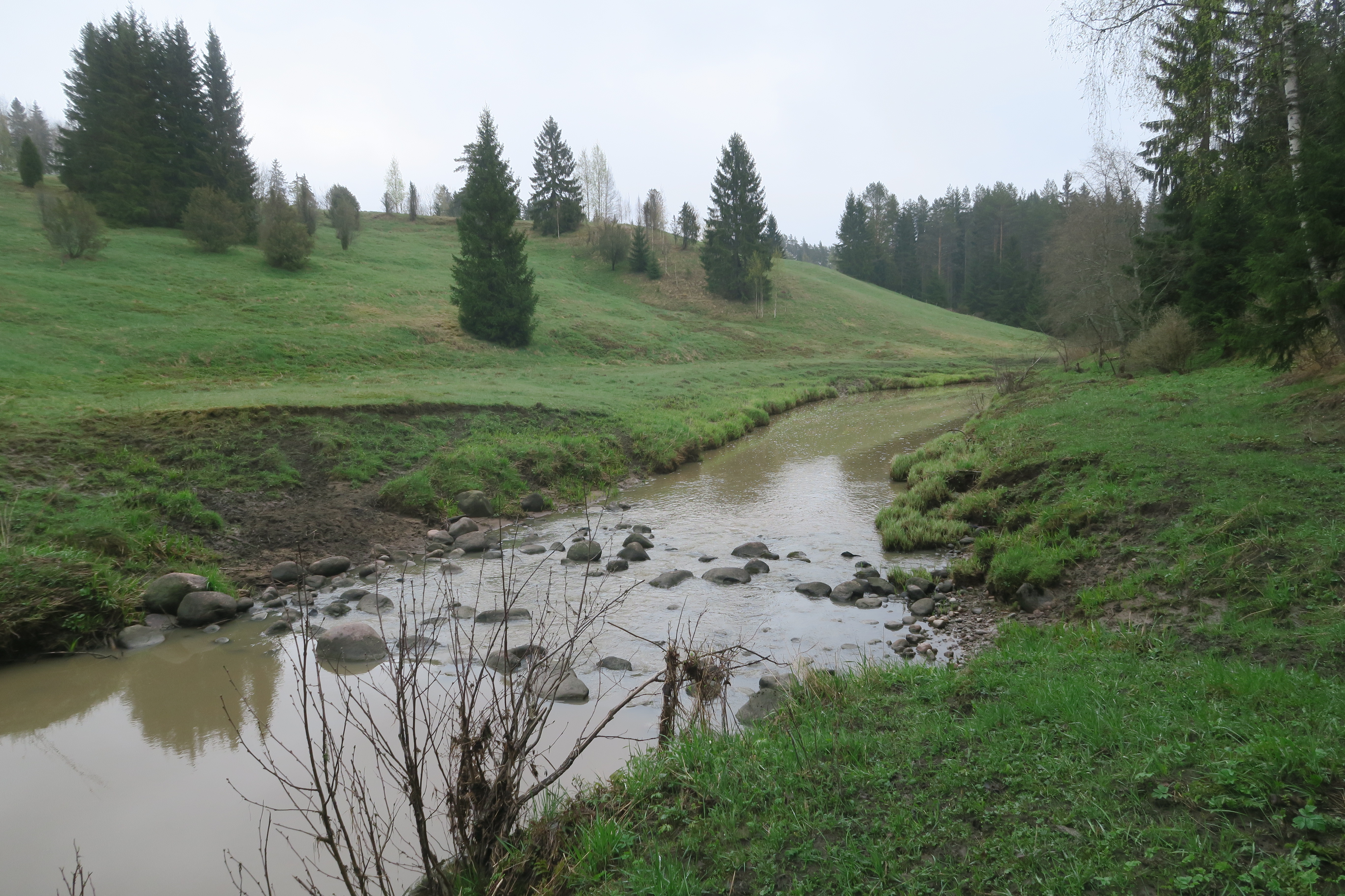 Peurojen käyttämä kahluupaikka Rekijoessa Kiikalan Hirvelässä Salossa Varsinais-Suomessa Suomessa keväällä 2019